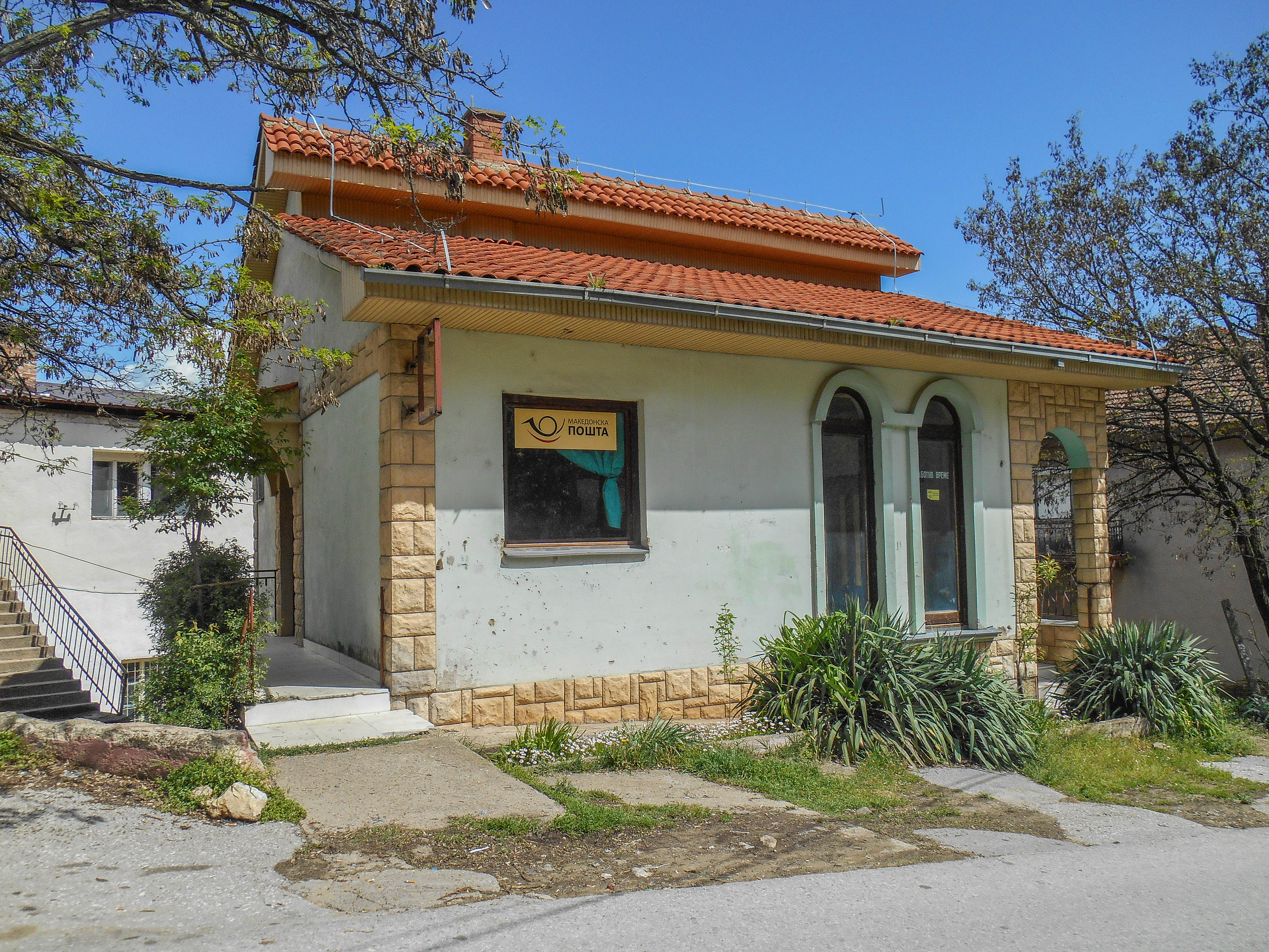 Пошта